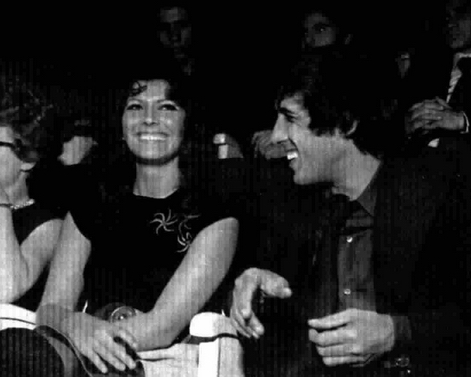 Italian singers Adriano Celentano and Claudia Mori, Teatro 10, Rome.